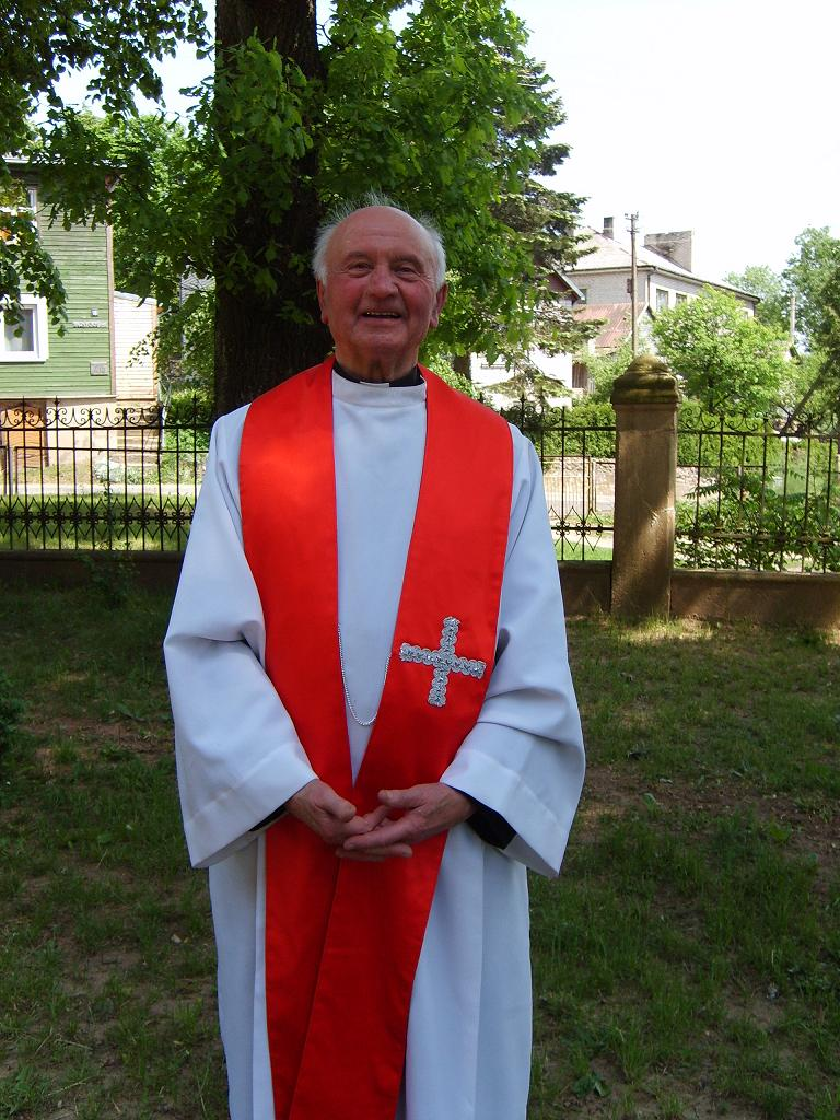 kunigas jubiliatas Leonas Kalinauskas